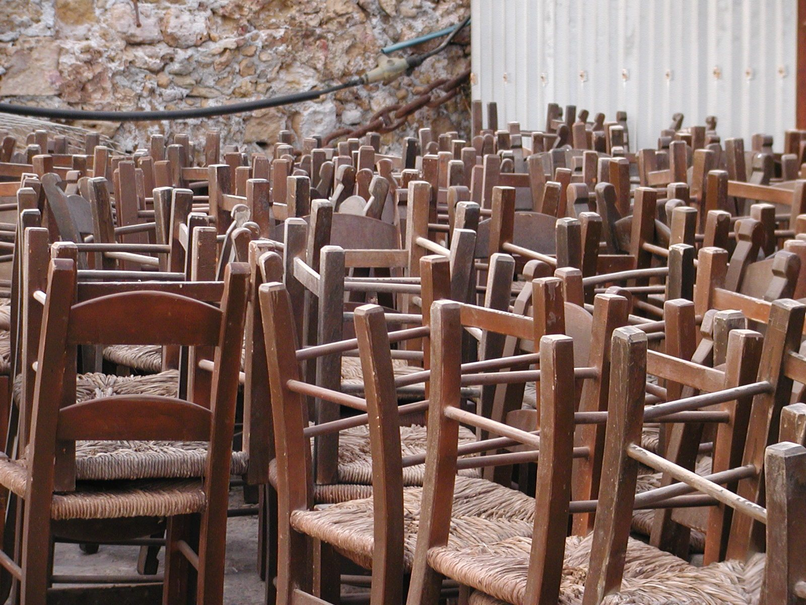 Überwinternde Holzstühle mit Sitzflächen aus Strohgeflecht im Hafen von Chania